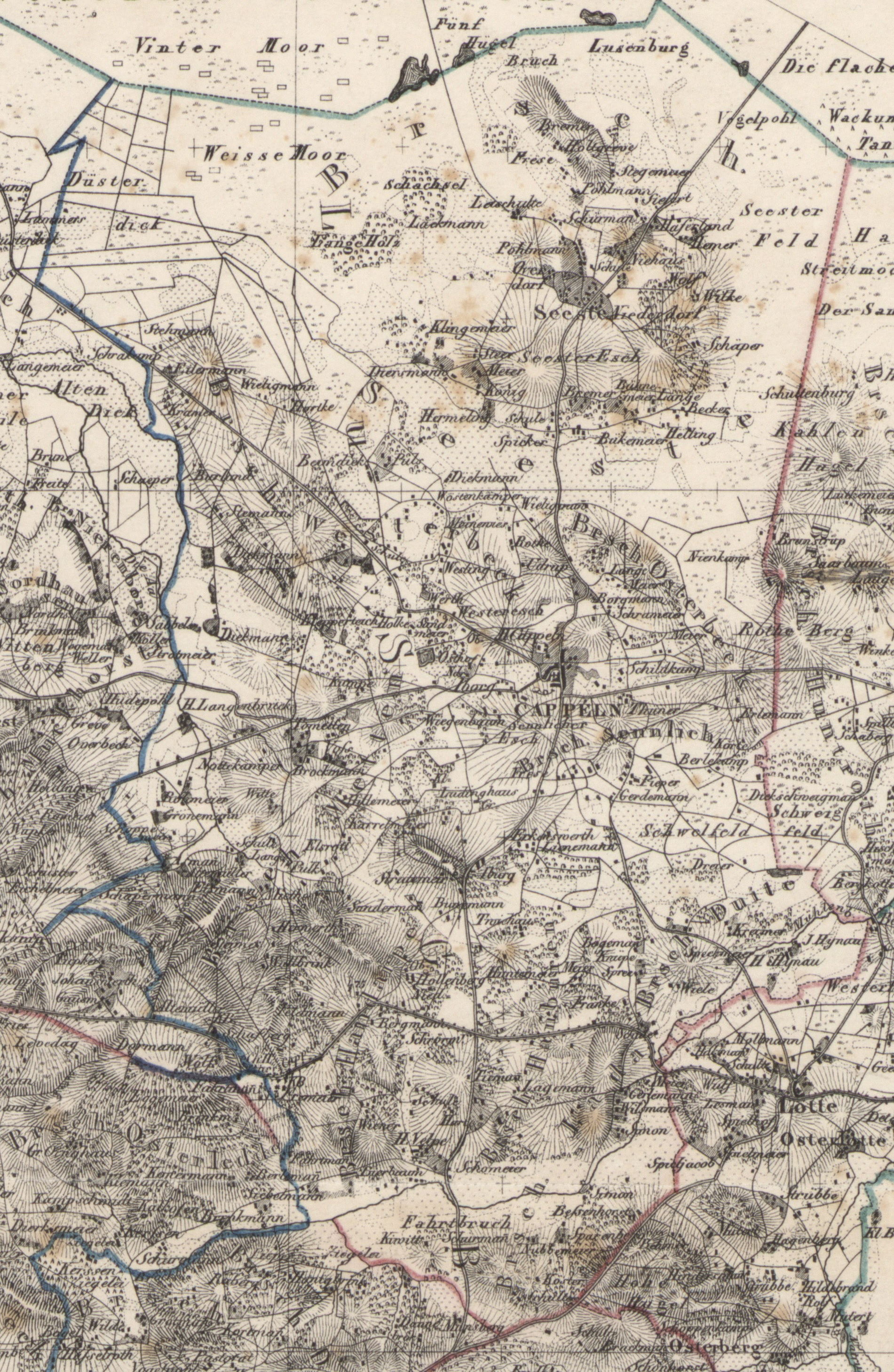 Location of Stadt- and Landgemeinde Westerkappeln (formerly Cappeln)